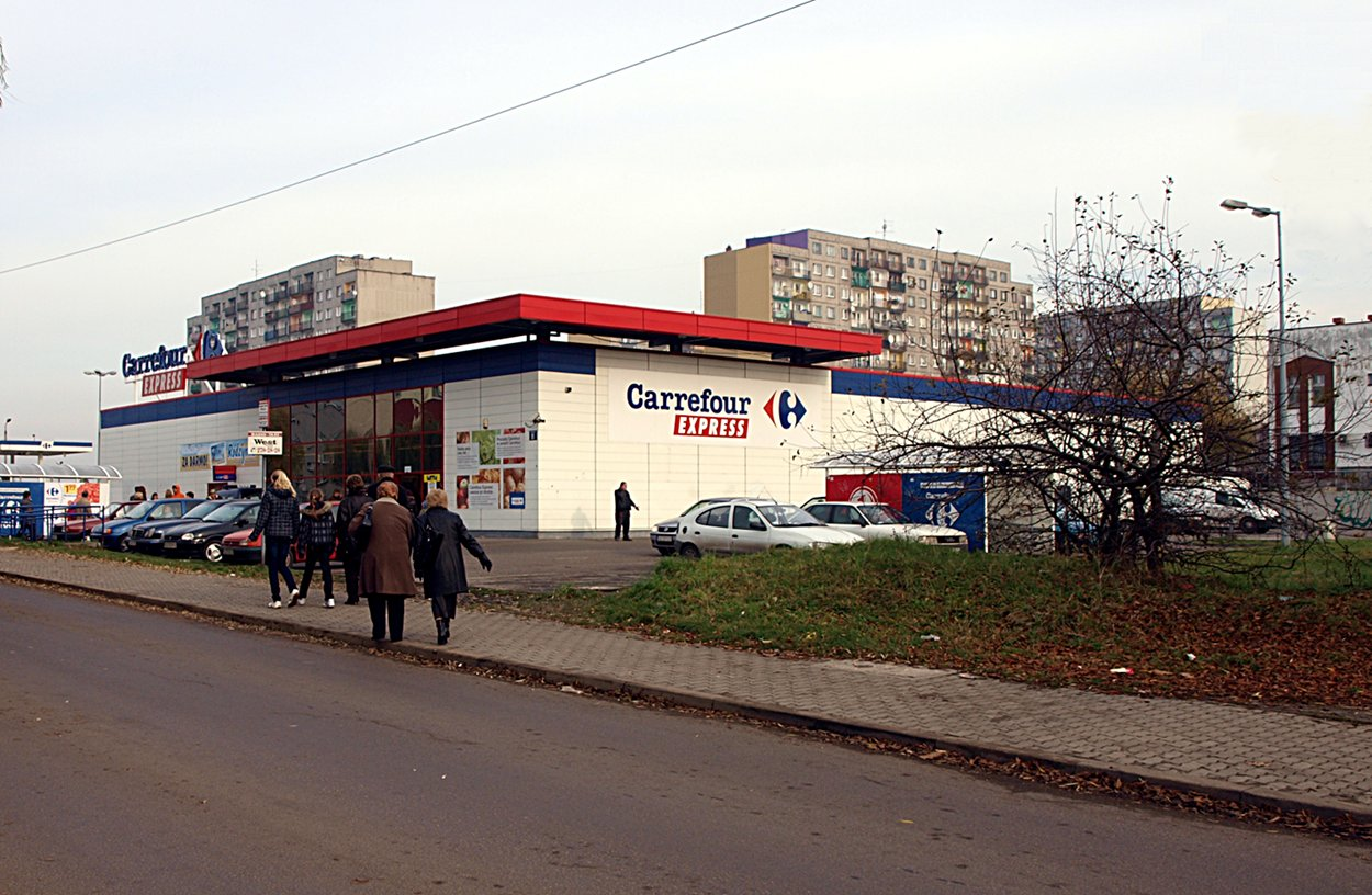 Ulica Janika w Zabrzu. Carrefour Express.